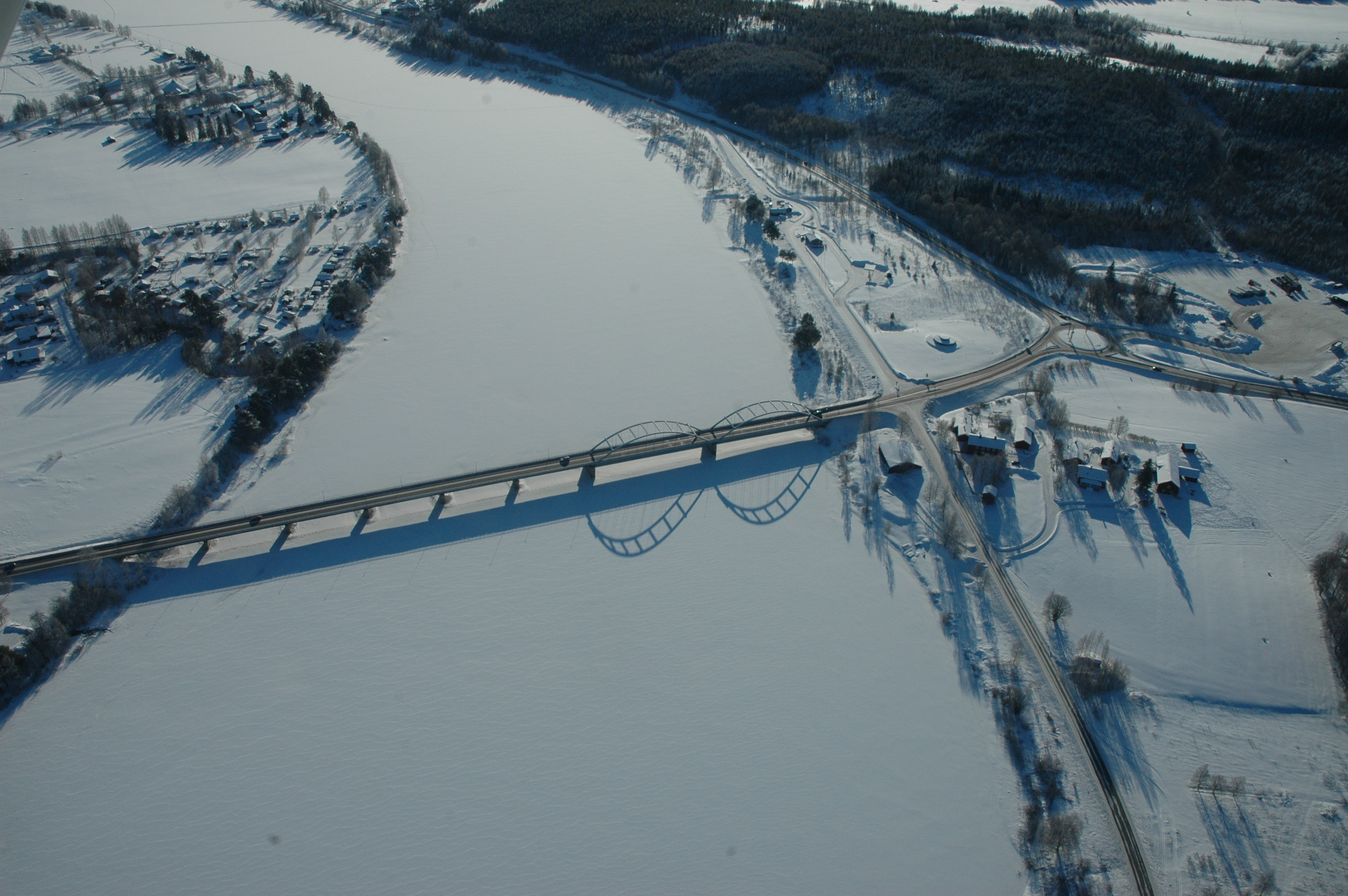 Ljusdal, Stavsäter